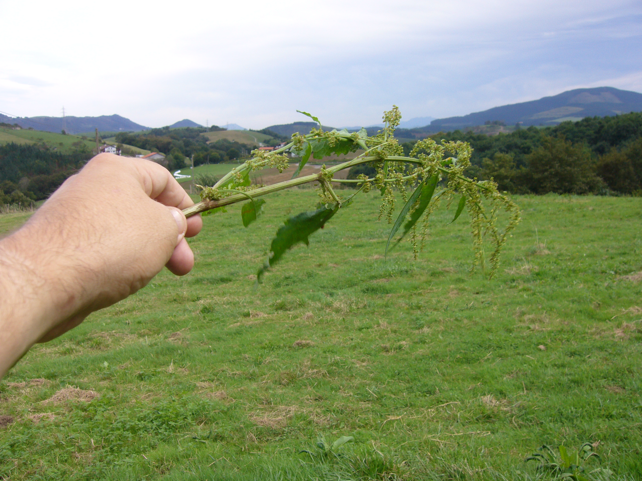 Araoa uztaro belarrarekin. Ohiko euskal ohitura ekaitzen ireluak uxatzeko.